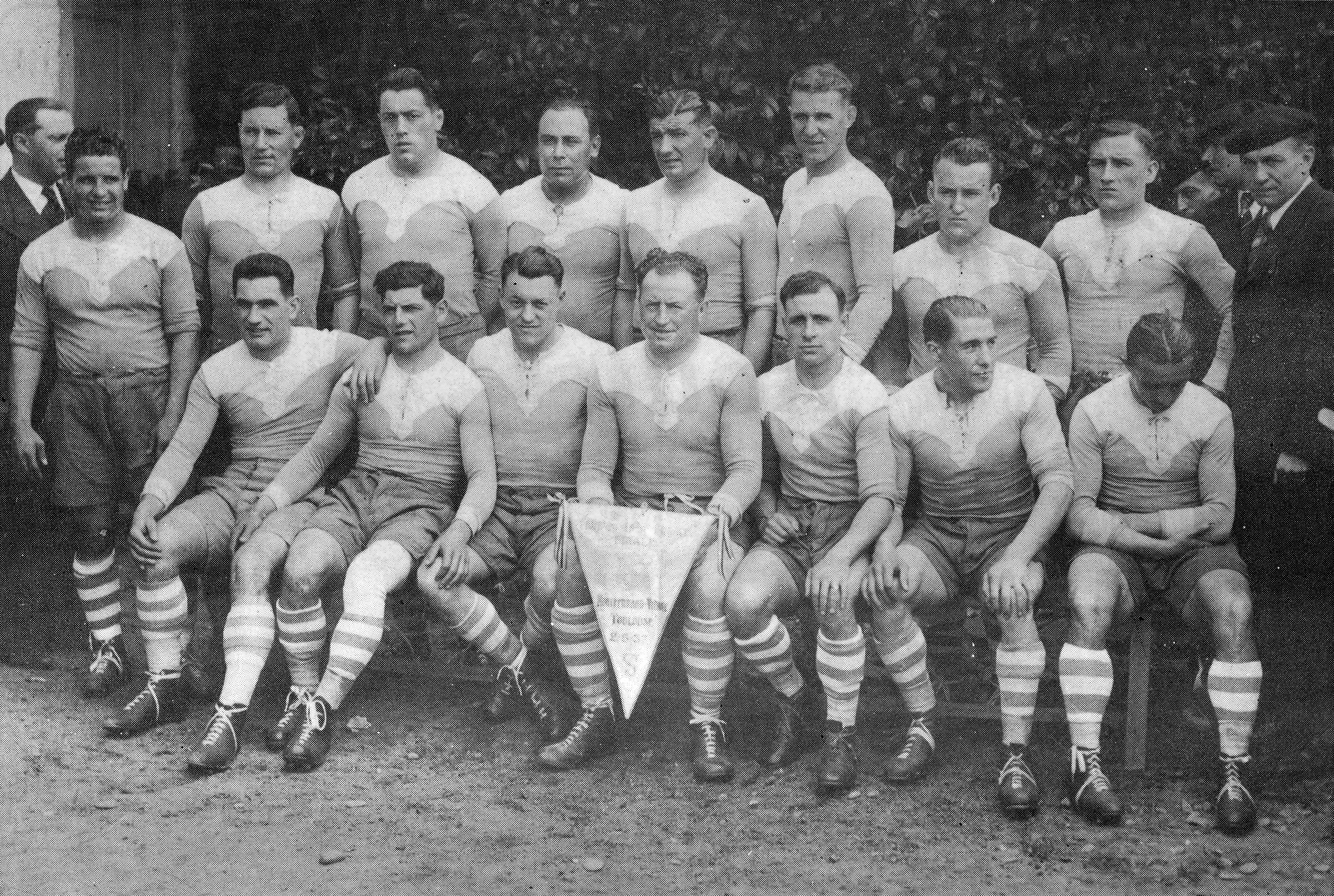 l'équipe